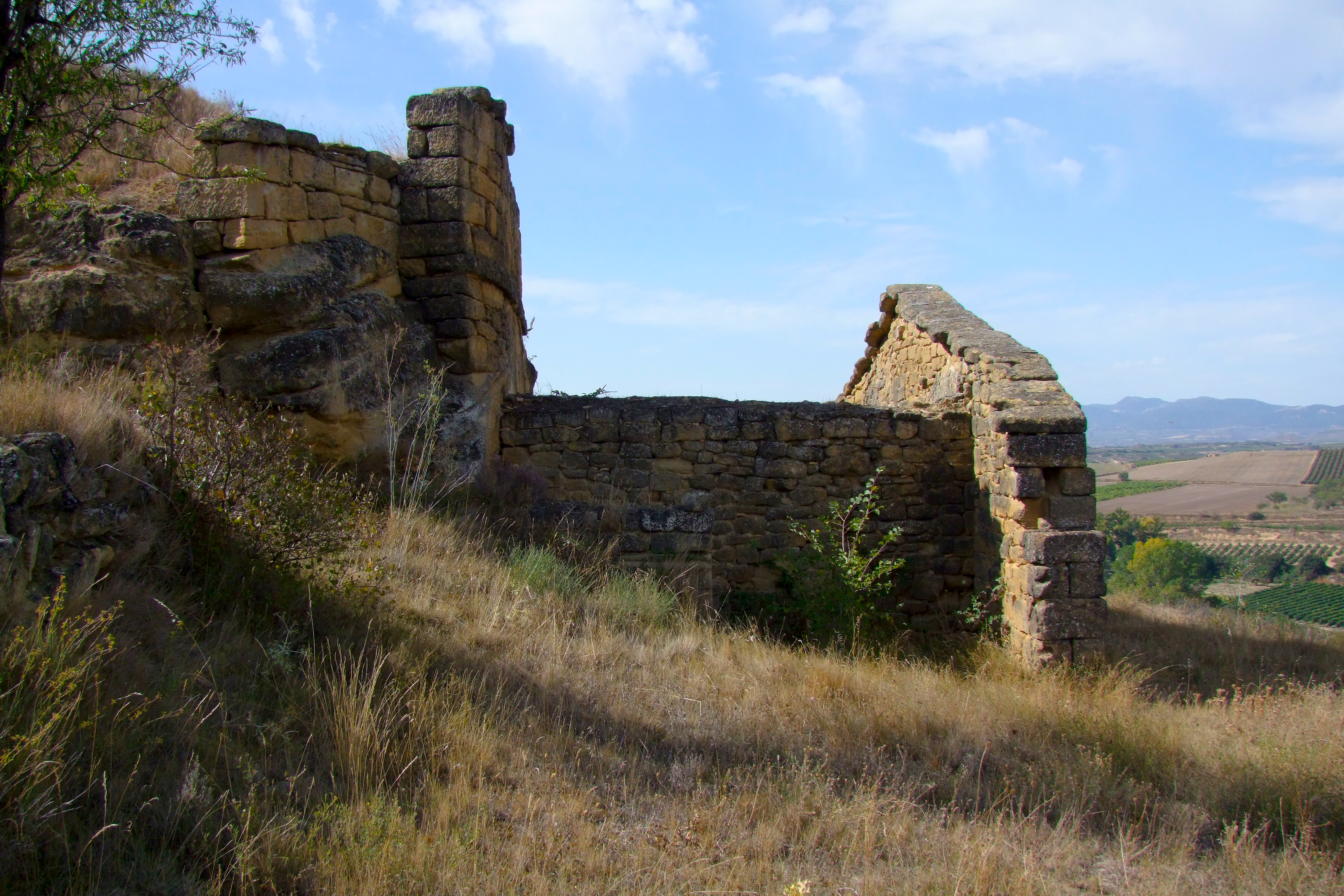 Ermita de San Bartolomé en la localidad de Briones, La Rioja - España